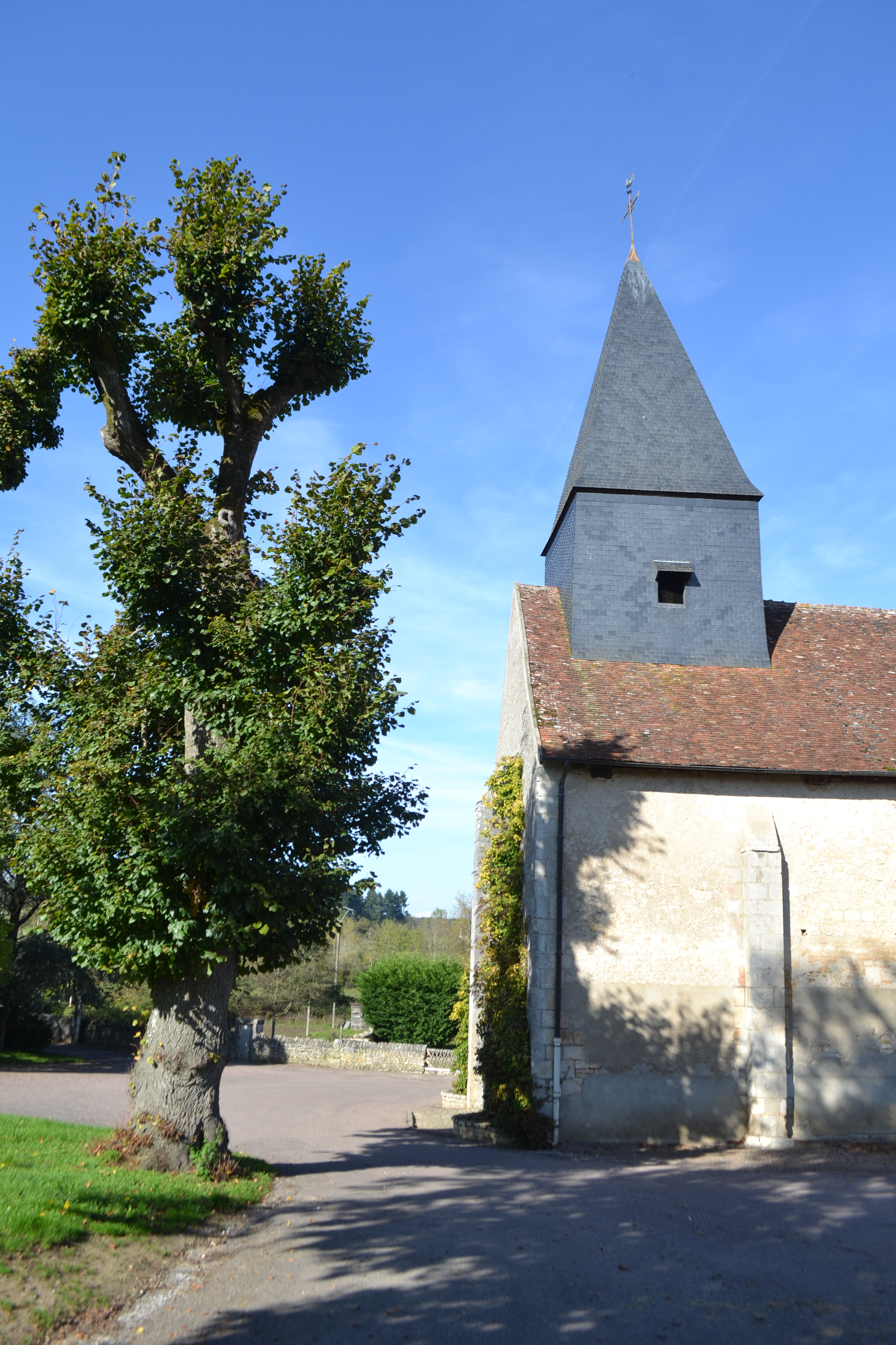 L'église de Narcy (Nièvre).